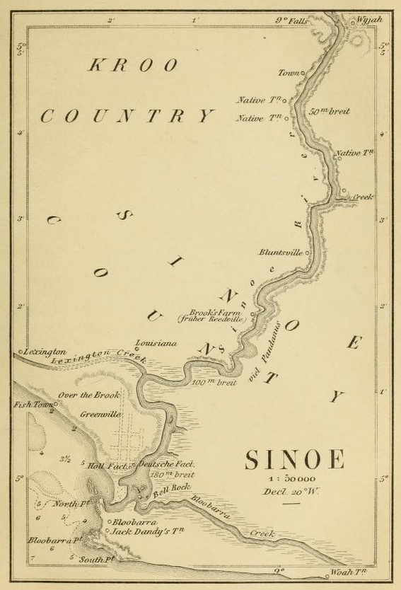 Vol.1 Map